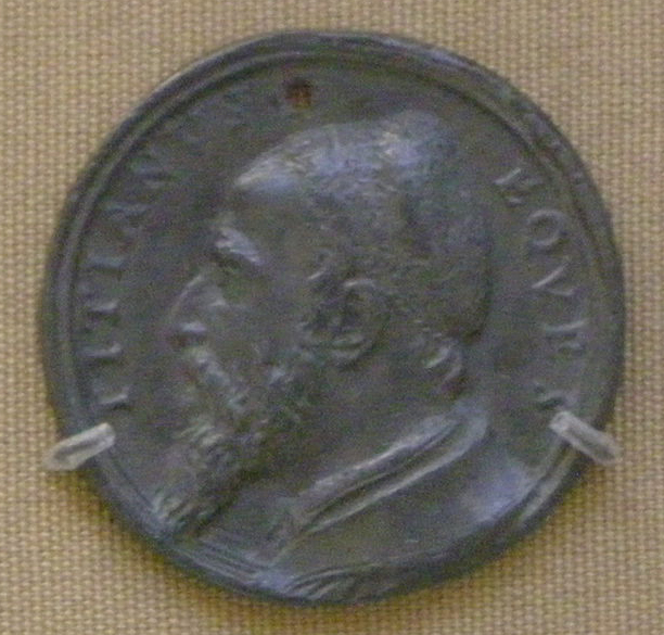 Pastorino, medaglia di tiziano, 1545 circa